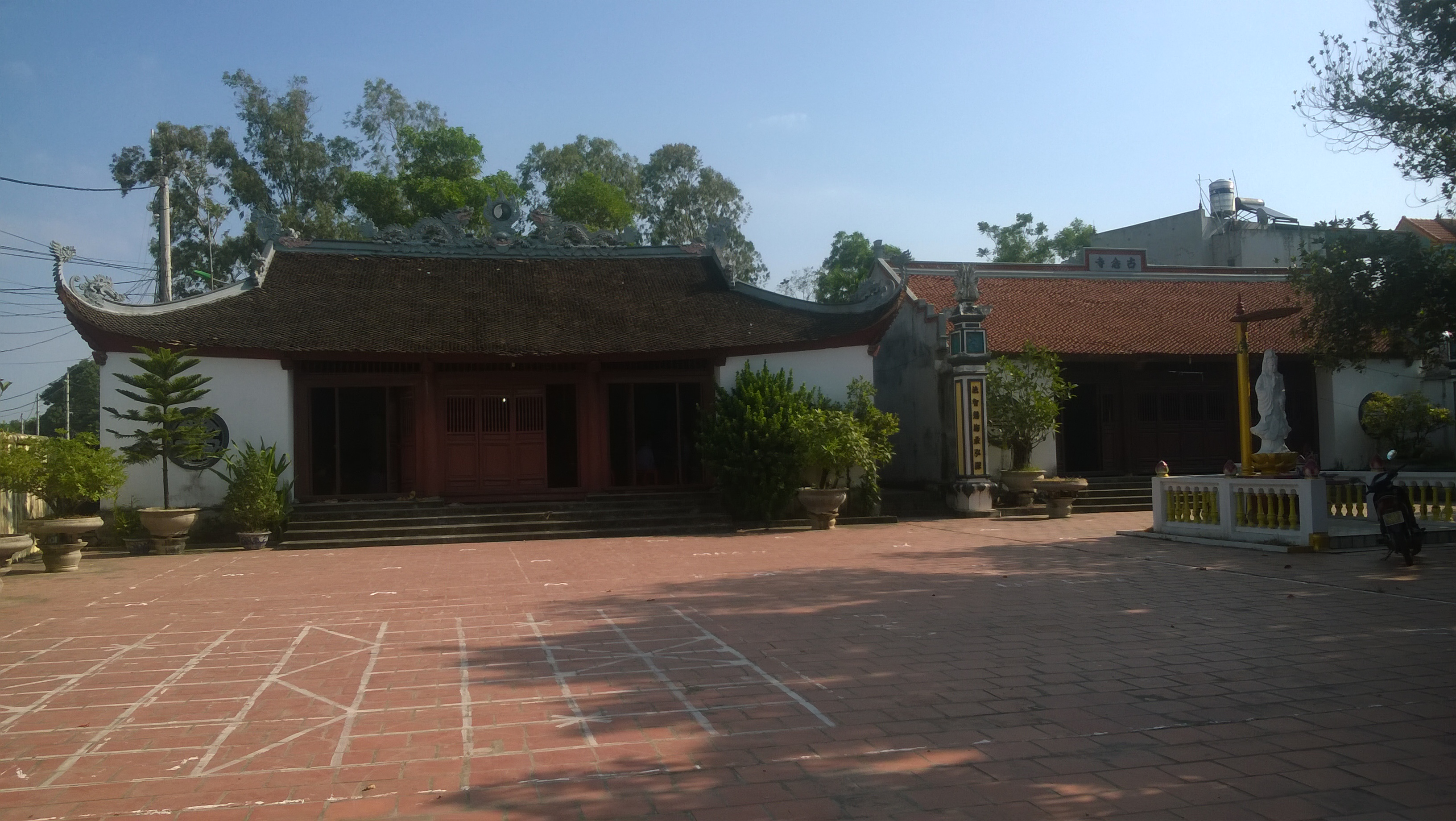 Đình Ném Đoài thờ Nguyễn Thủ Tiệp - vị tướng thời vi:12 sứ quân chiếm đóng Tiên Du - Bắc Ninh